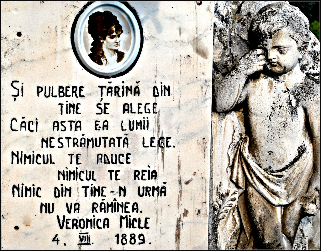 la Biserica "Sf. Ioan Botezătorul" Varatic